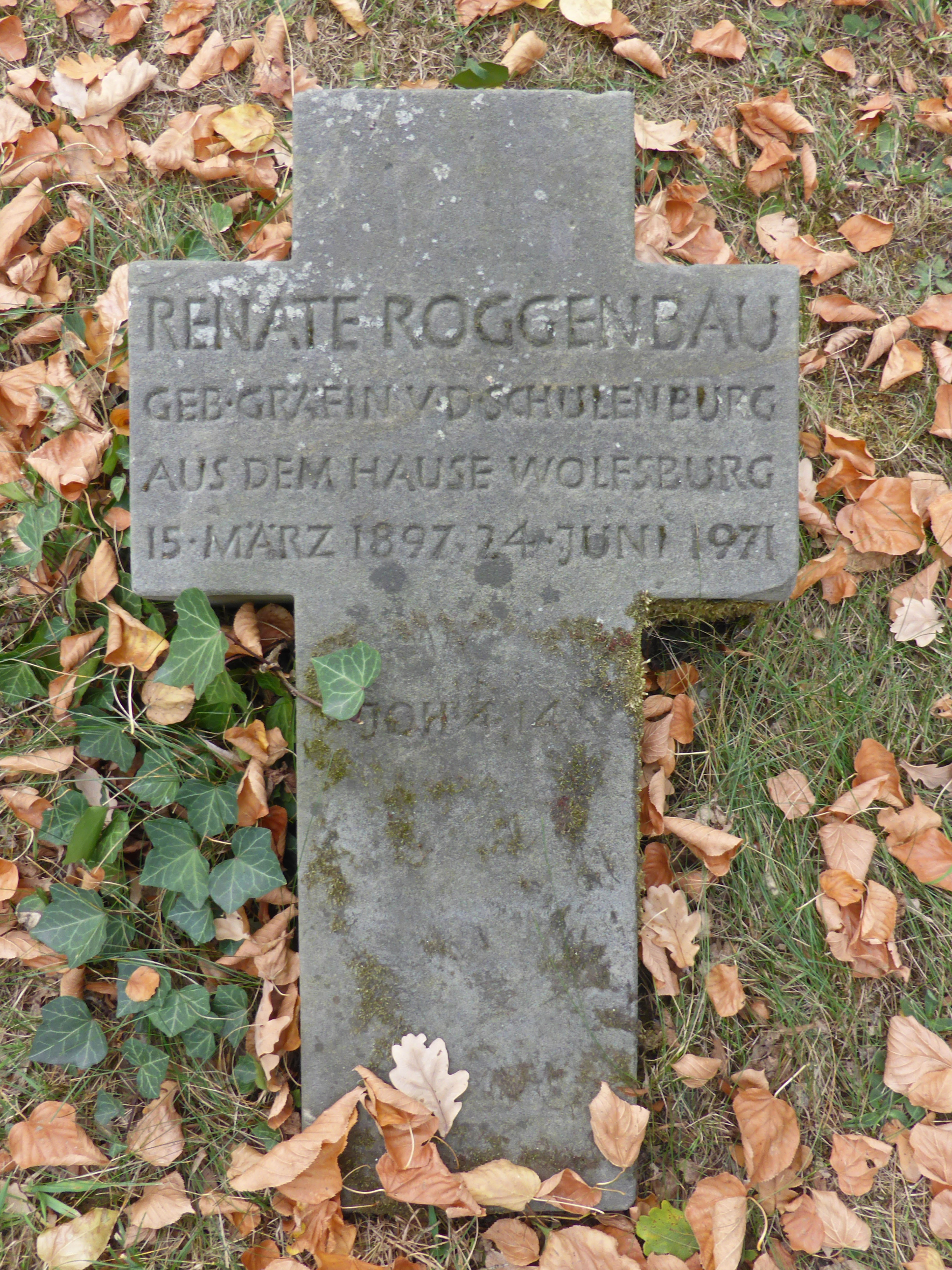 Grabstein von Renate Roggenbau, geb. Gräfin von der Schulenburg-Wolfsburg, geb. am 15. März 1897, gest. am 24. Juni 1971, Tochter von Werner Karl Hermann Graf von der Schulenburg-Wolfsburg und Frieda Gräfin von der Schulenburg-Wolfsburg, geb. Freiin von der Bussche-Ippenburg. Ex-Frau von Graf Günther von Stosch, danach Frau von Prof. Dr. Christel Roggenbau.